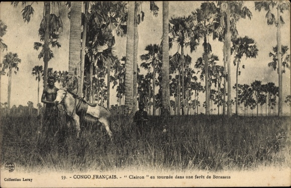 59 - Congo Français - "Clairon" en tournée dans une forêt de Borassus